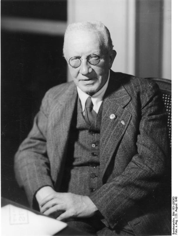 Professor Dr. Kümmel Generaldirektor der Preussischen Museen 23.8.40